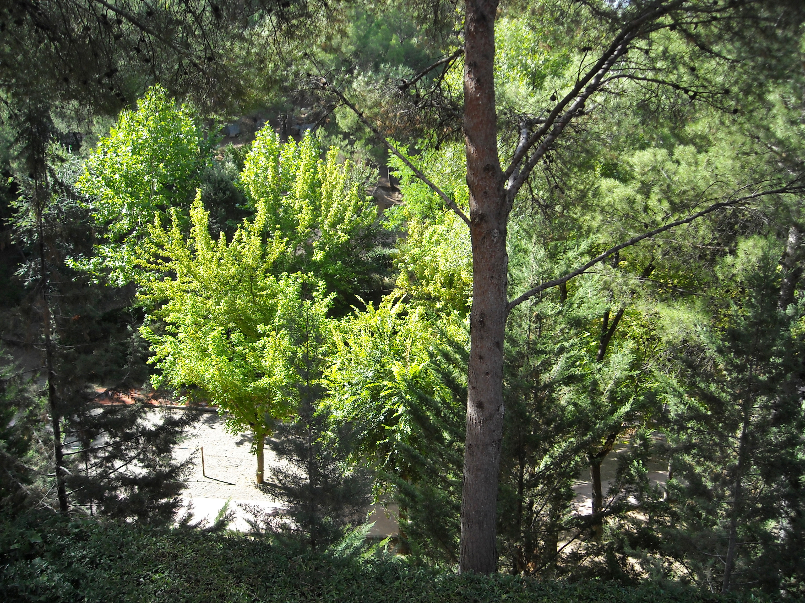 Teruel. Parque de Los Fueros.